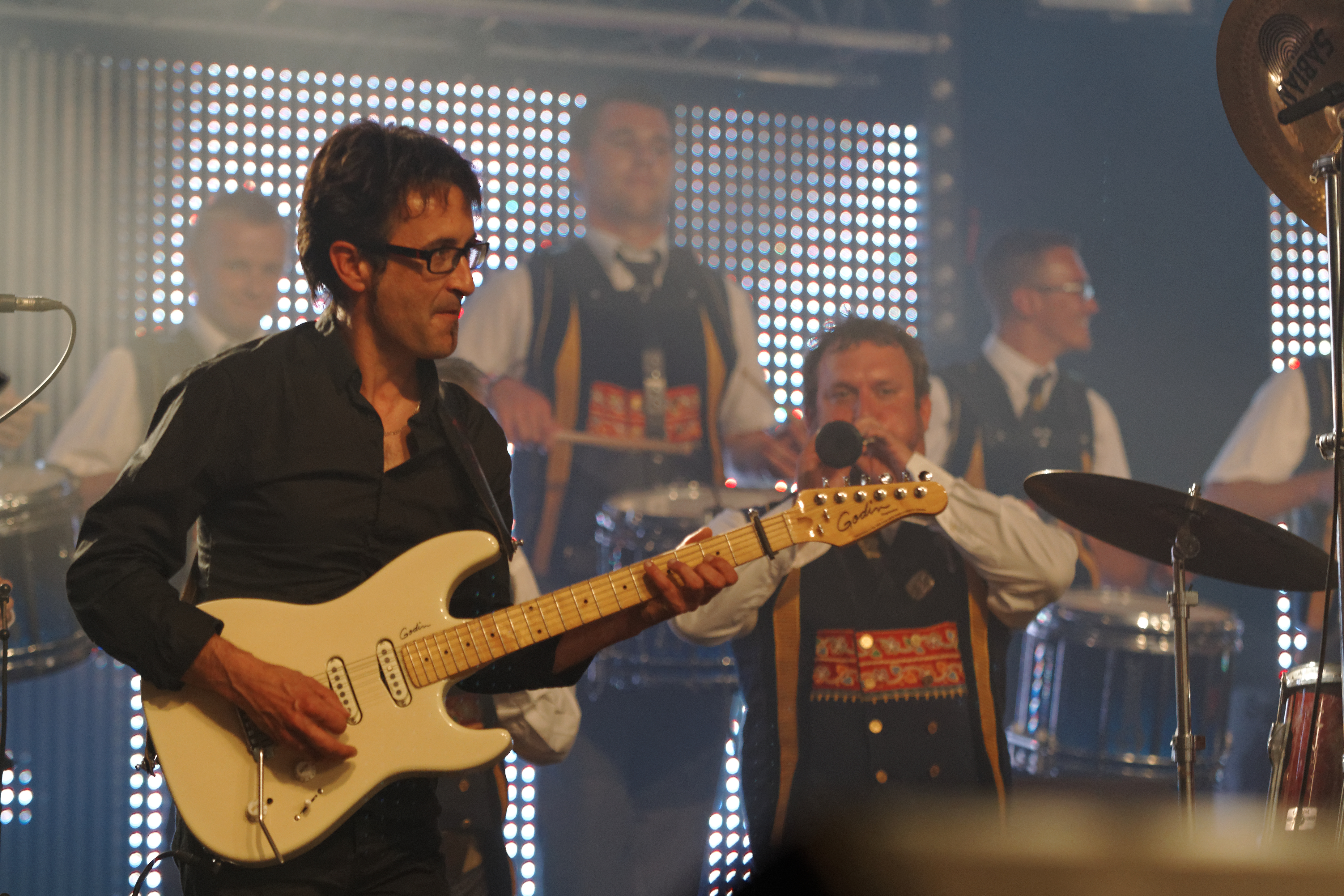 David Er Porh avec Dan Ar Braz et le bagad Kemper en concert à l'espace Gradlon lors du festival de Cornouaille 2013, à l’occasion des 90 ans du Cornouaille et des 20 ans de la création de l’Héritage des Celtes.